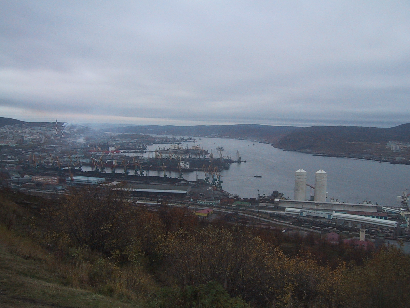 Мурманская гавань